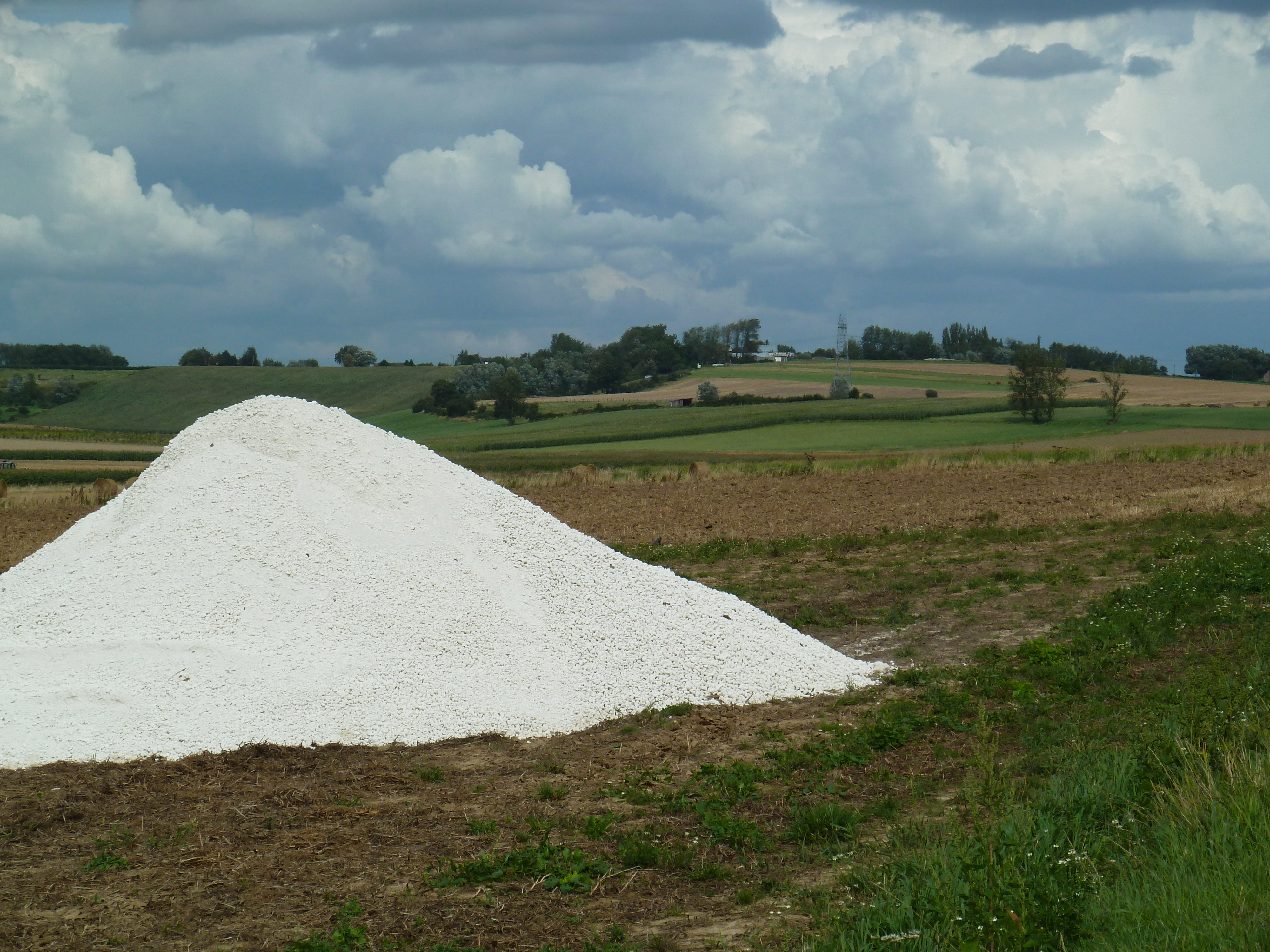 Le vallon de la becque du Dail vu du hameau 'Les Ciseaux" à Boëseghem dans le Nord Nord-Pas-de-Calais.- France.